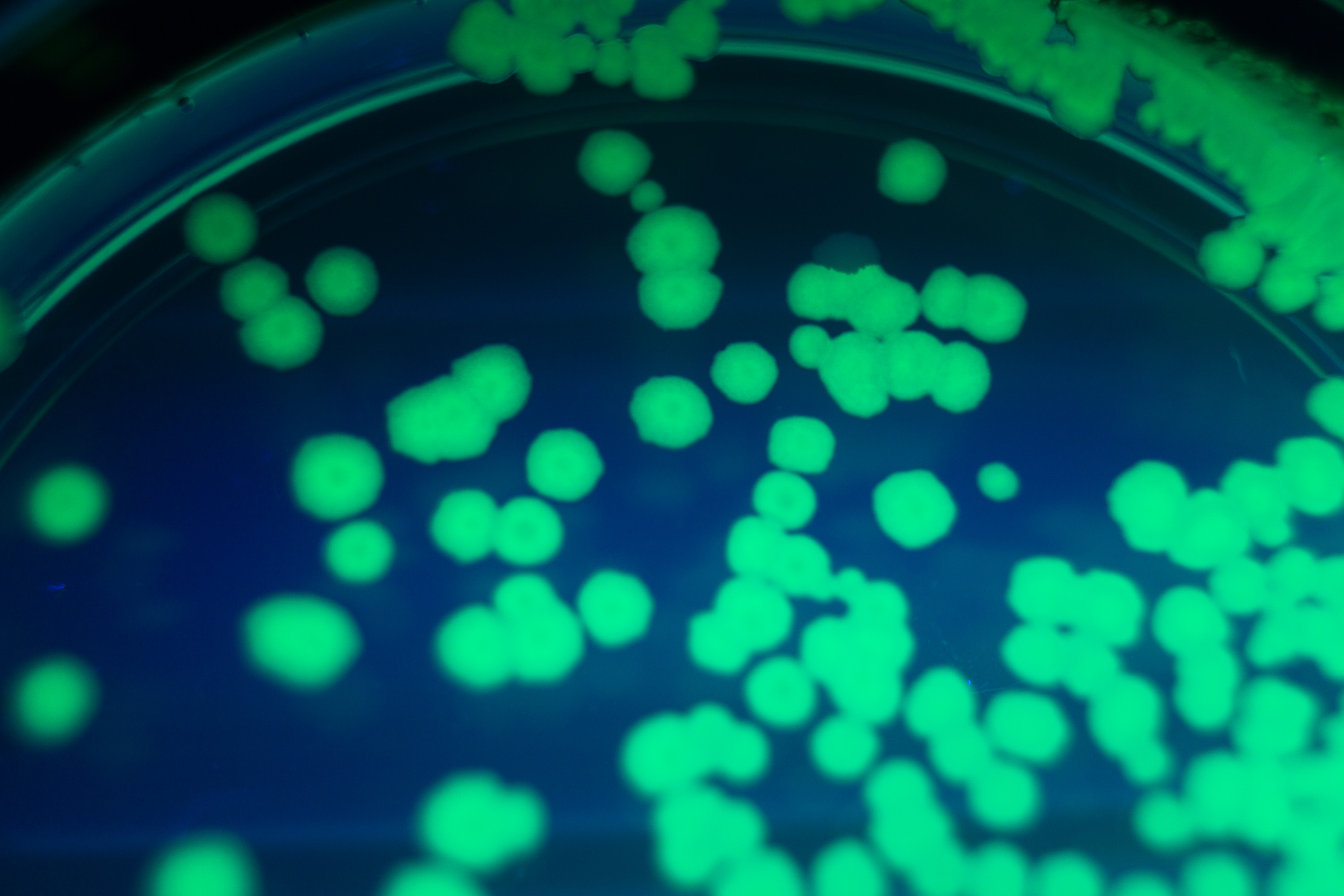 紫外線下において蛍光を発するGFP遺伝子を導入した遺伝子組換大腸菌